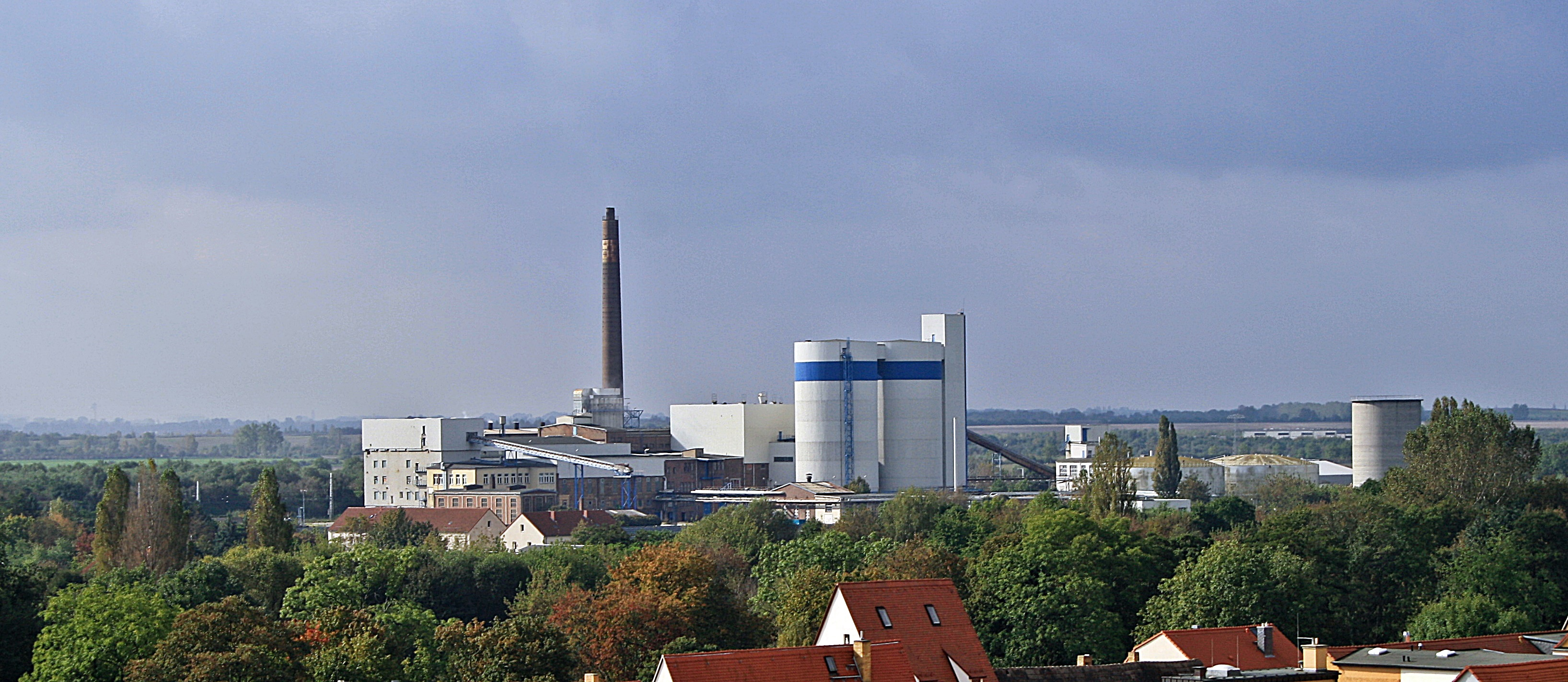 Die heutige Biogasanlage und frühere Zuckerfabrik in Delitzsch